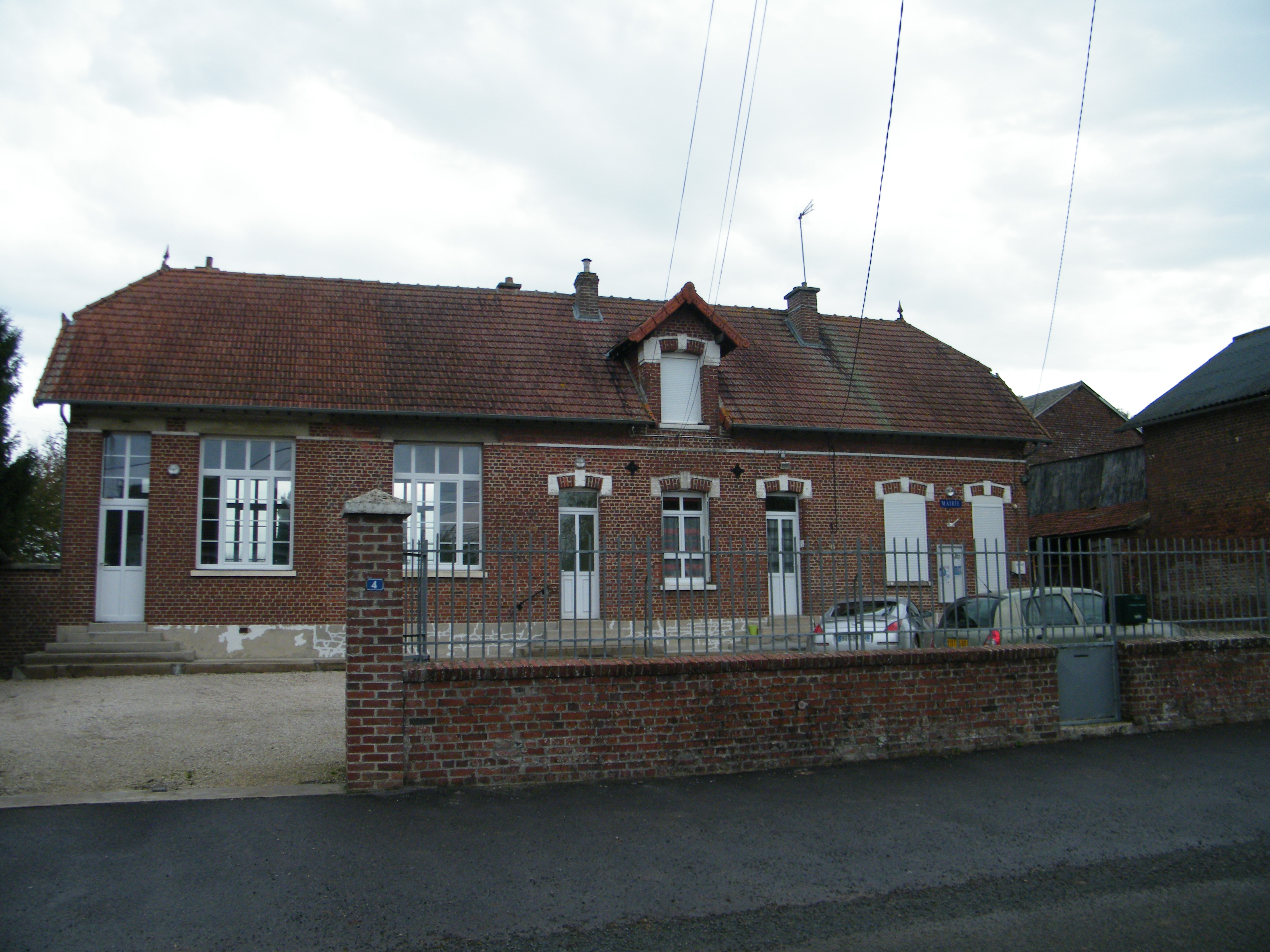 Mairie-école.